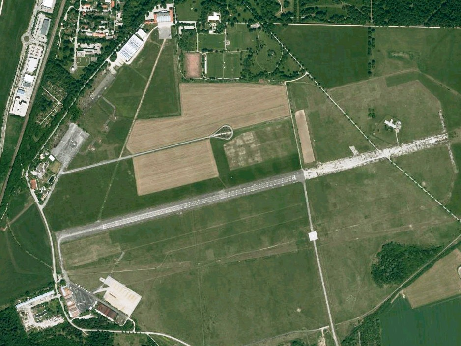 Luftaufnahme der Bayerischen Vermessungsverwaltung: Flugplatz Oberschleißheim, Landkreis München, Bayern.